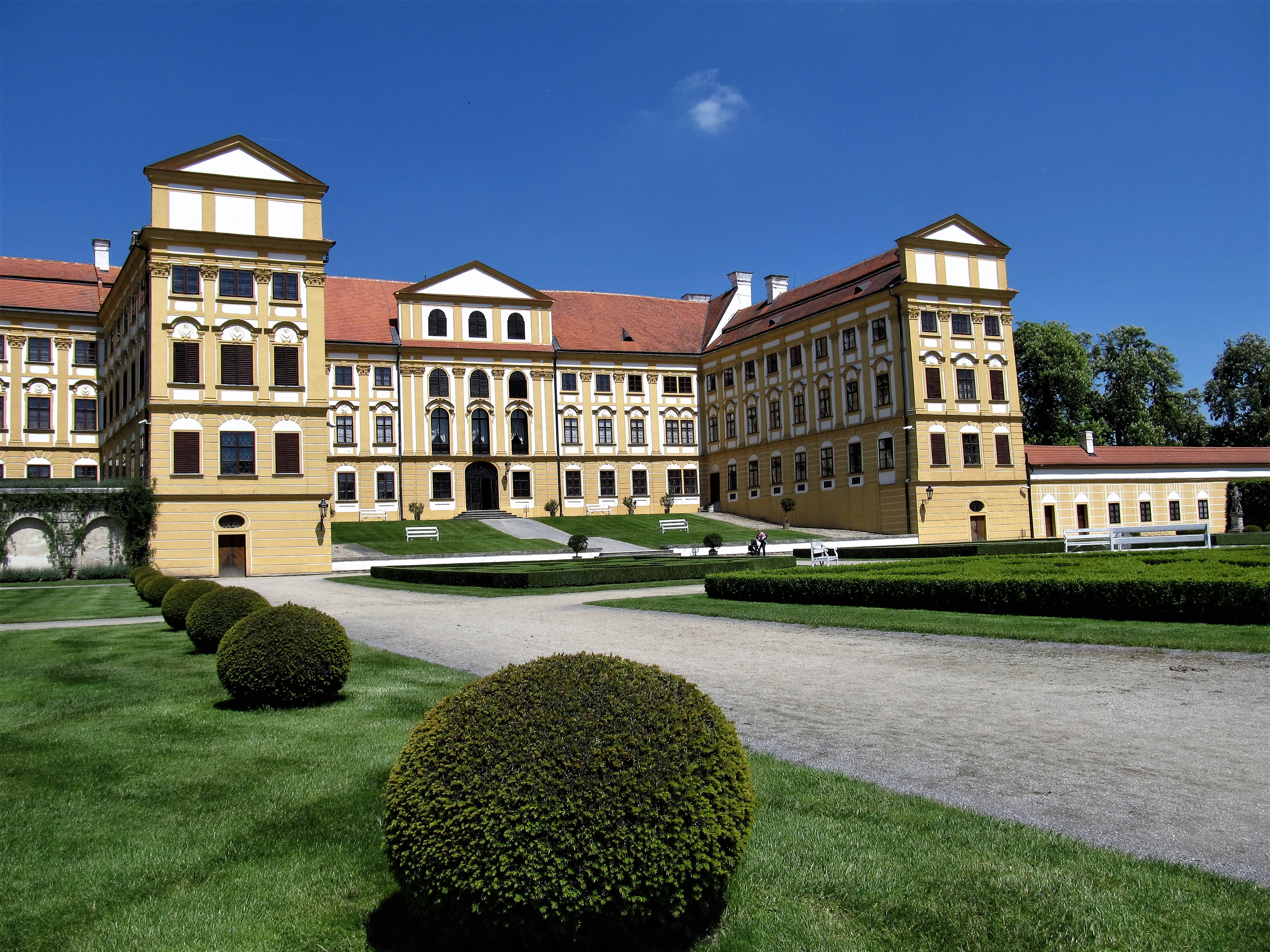 Pohled na zámek ze zahrady